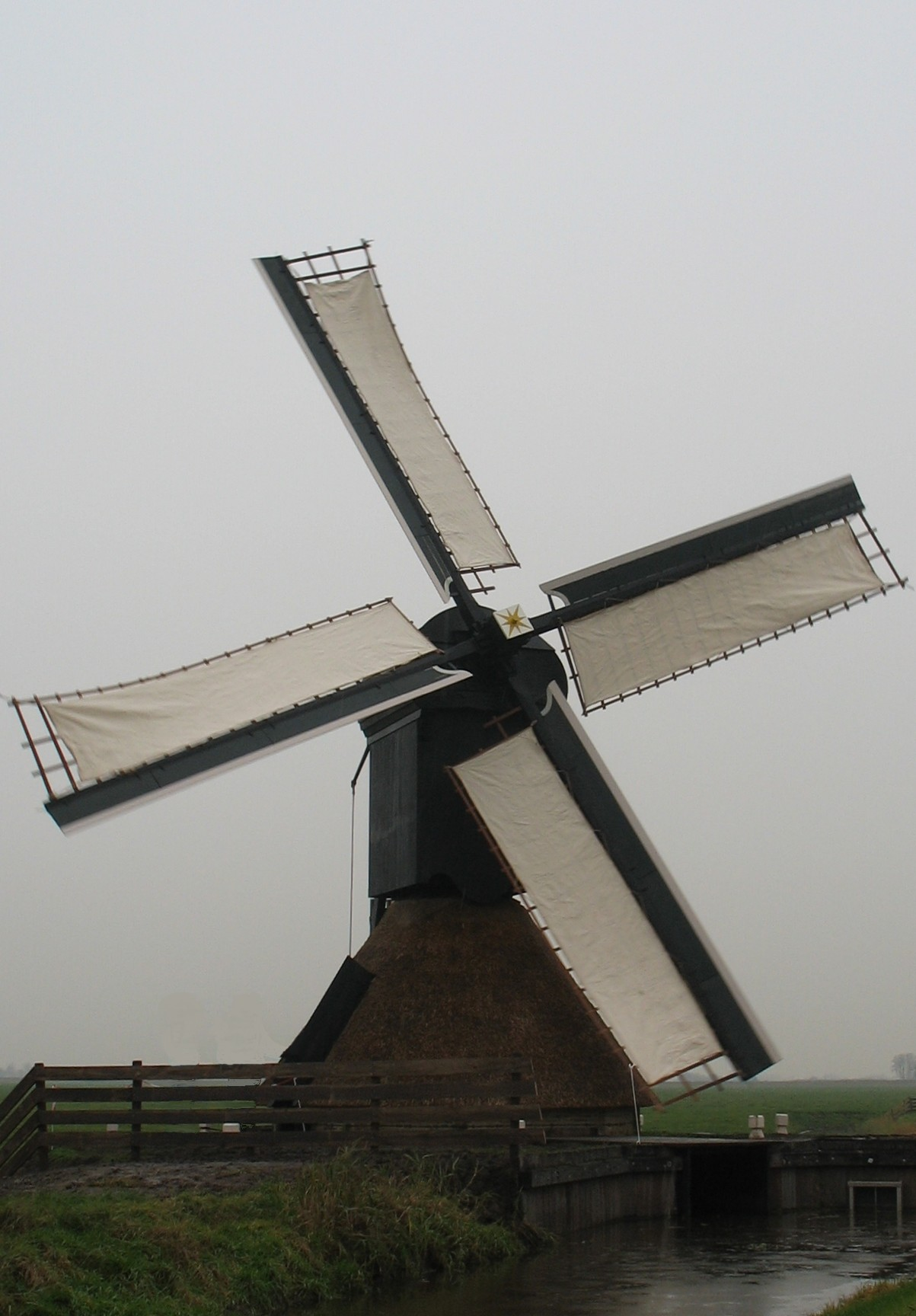 De in 2008 gerestaureerde Spinnenkop bij bij Nijhuizum